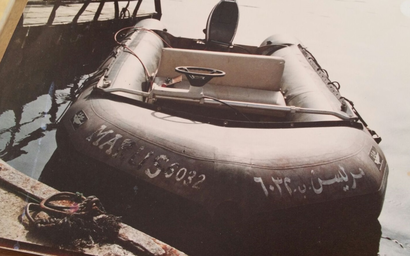 סירת גומי ששימשה מחבלי פתח לחדור ללבנון לאחר שגורשו ממנה .